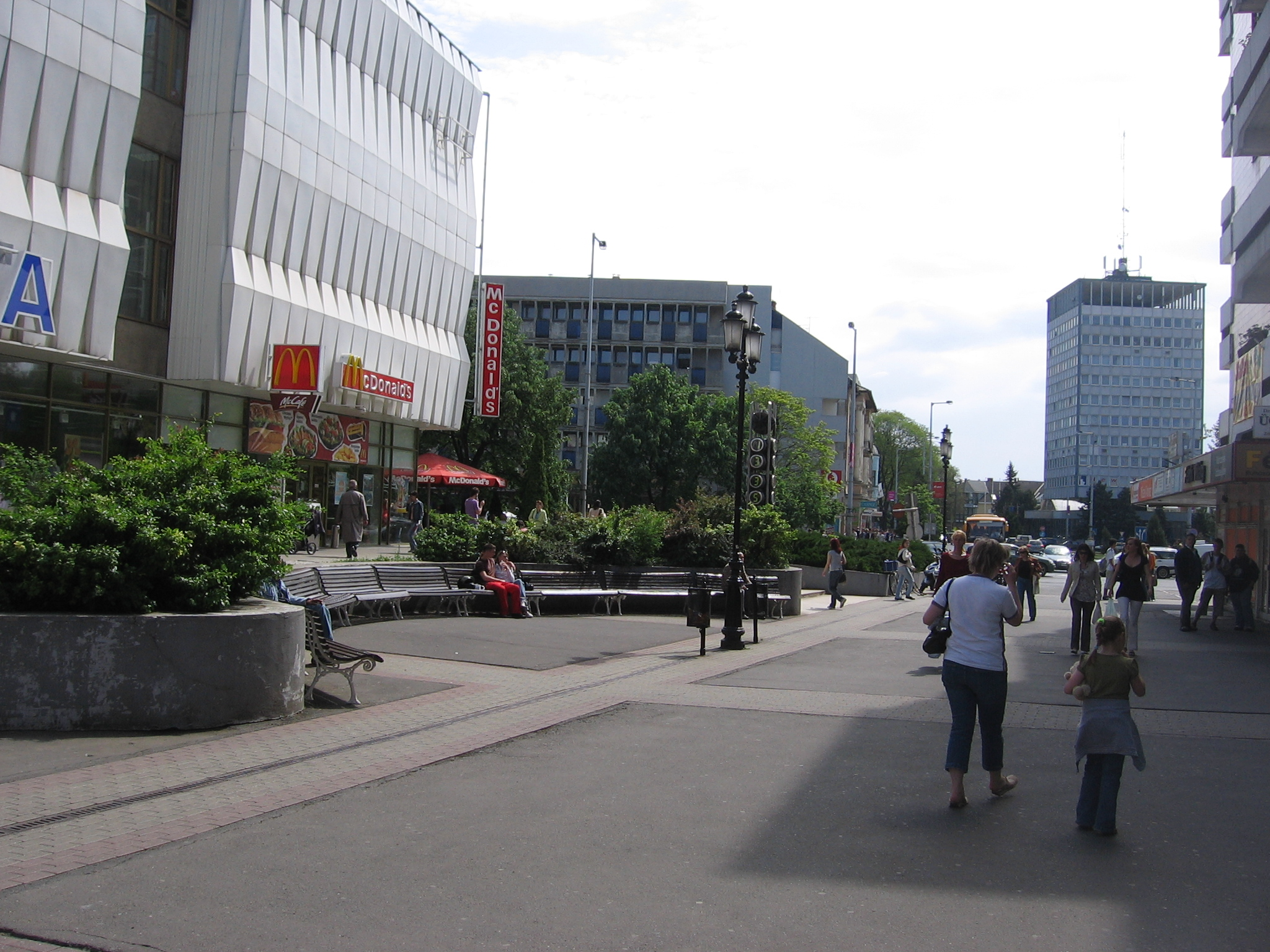 Main street (Zrínyi Ilona utca) in Nyíregyháza Główna ulica (Zrínyi Ilona utca) Nyíregyháza